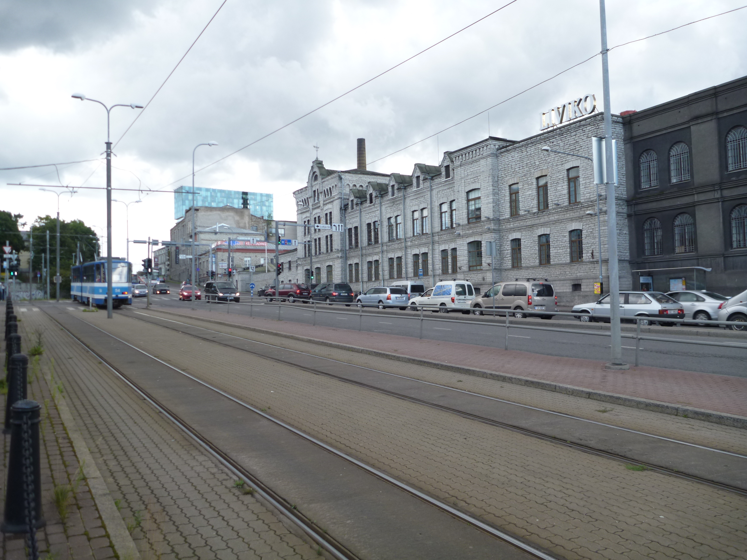 Liviko tehas Tallinnas Tartu maanteel.